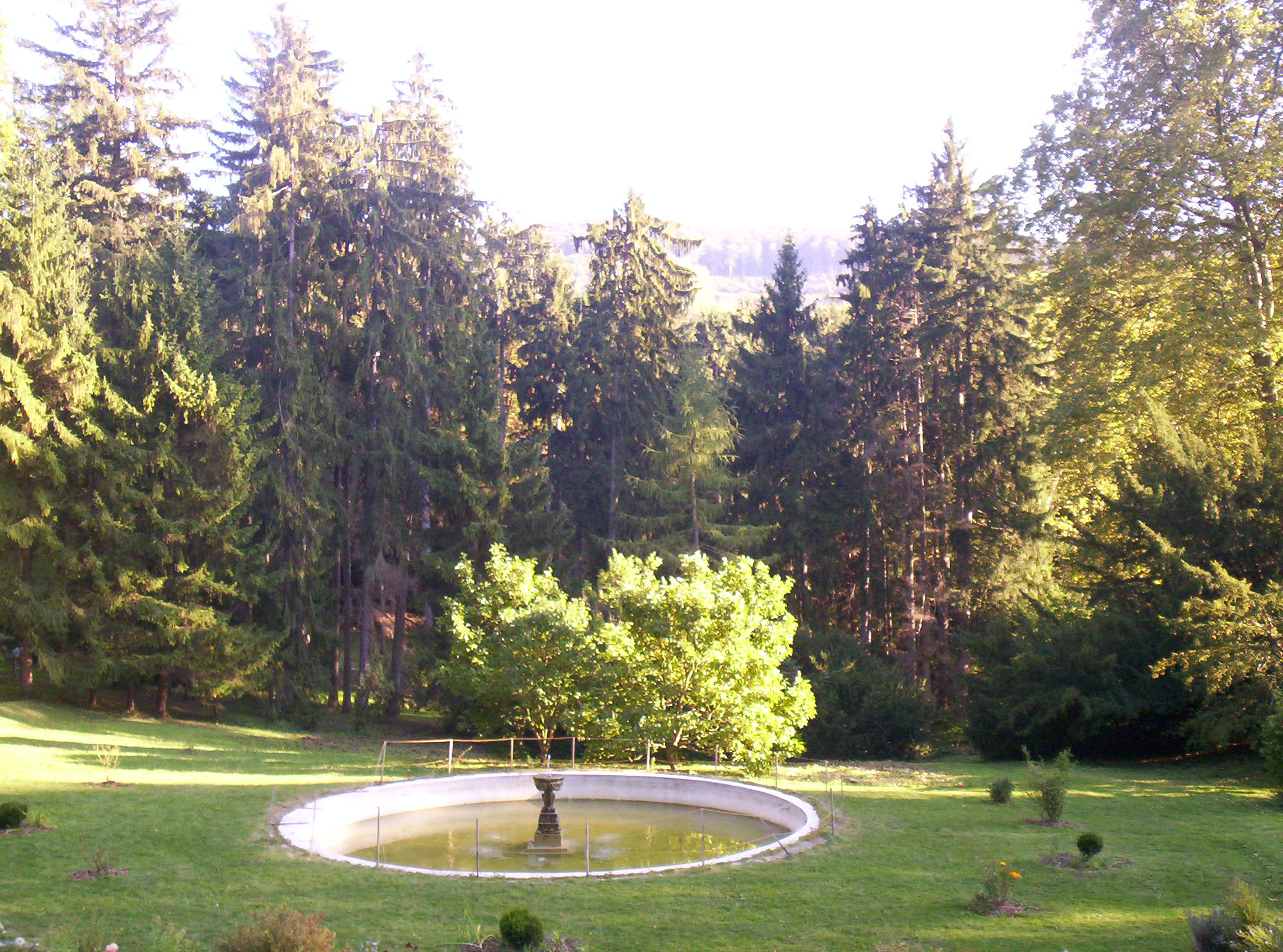 A püspökszentlászlói arborétum – photo taken by uploader User:Csanády in 2006.